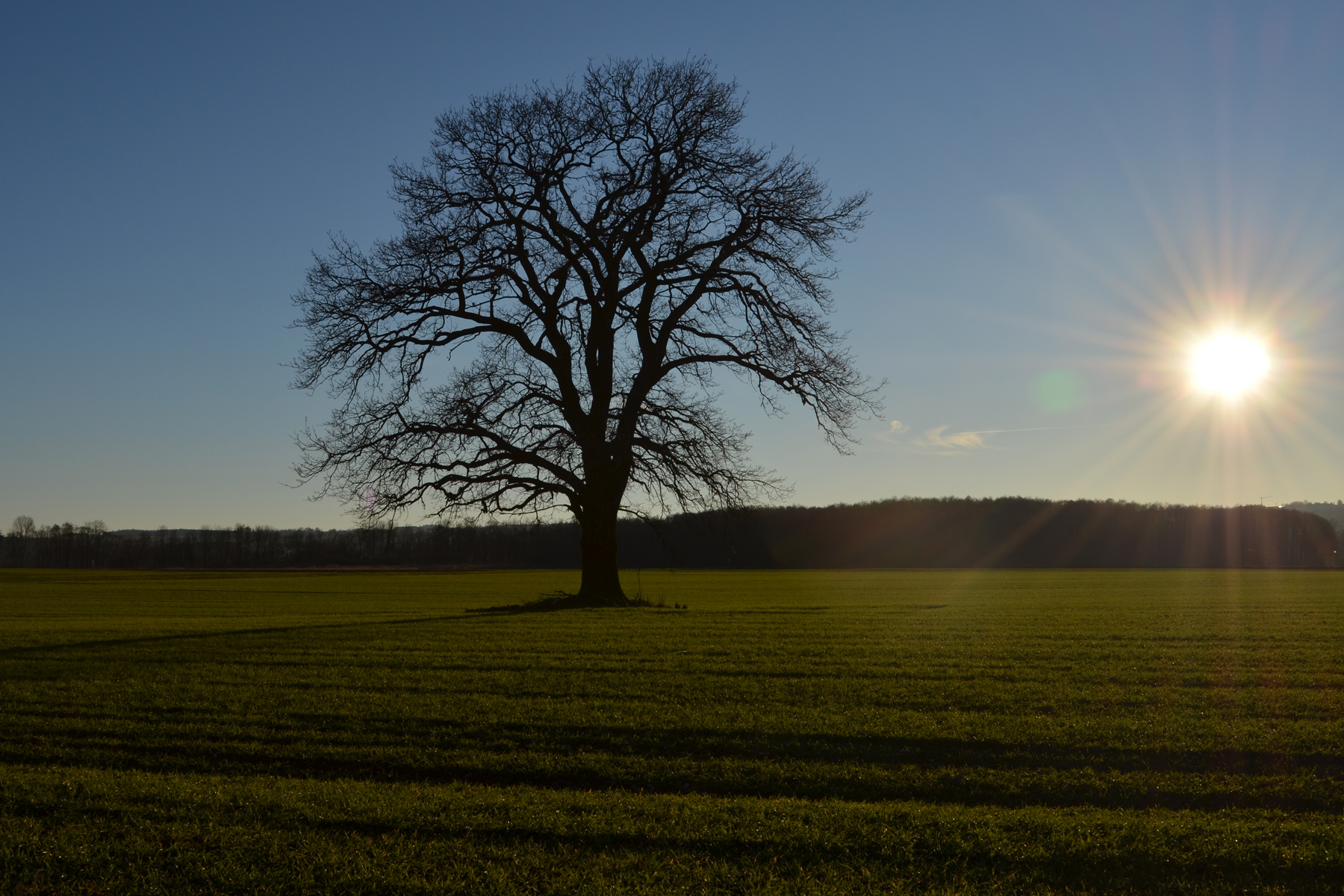 Kulturlandschaft in der Kronach-Au zwischen den Goldkronacher Ortsteilen Kottersreuth und Leisau